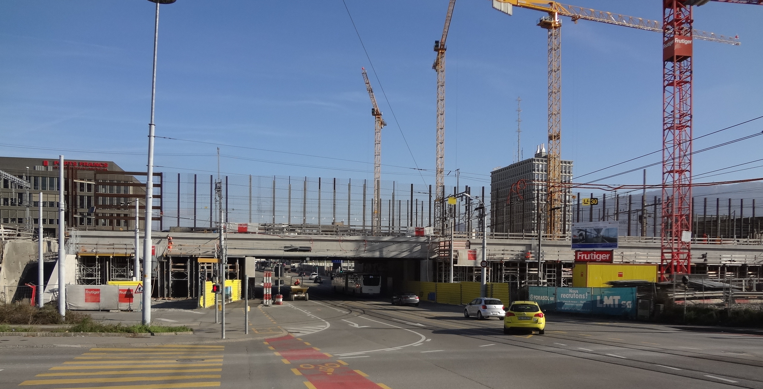 Vue du chantier de la gare de Lancy-Pont-Rouge, à la hauteur du pont sur la route des Acacias, au 15 novembre 2016.